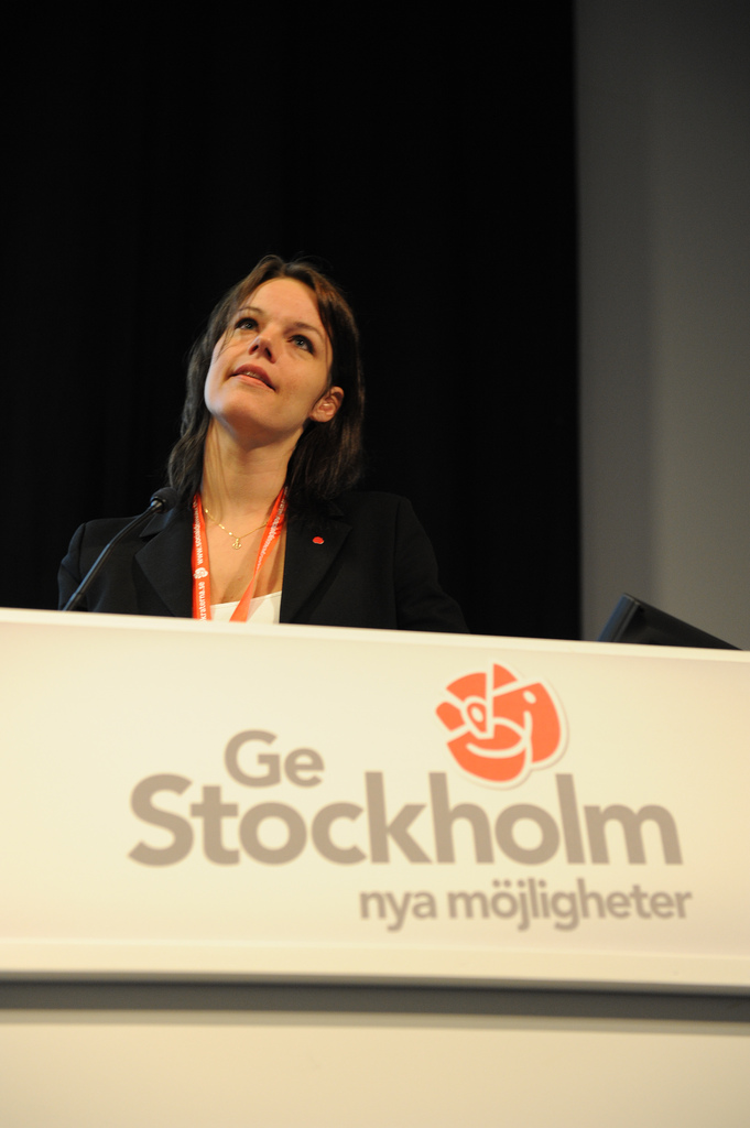 Socialdemokraterna i Stockholms stad och läns årsmöte respektive distriktsårskongress, Kistamässan 17-18 april. Foto: Linda Håkansson.